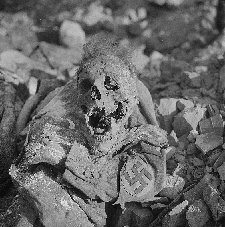 Original image description from the Deutsche FotothekTotenkopf und Leiche in Uniform (mit Hakenkreuz-Binde am Ärmel) in einem Luftschutzkeller